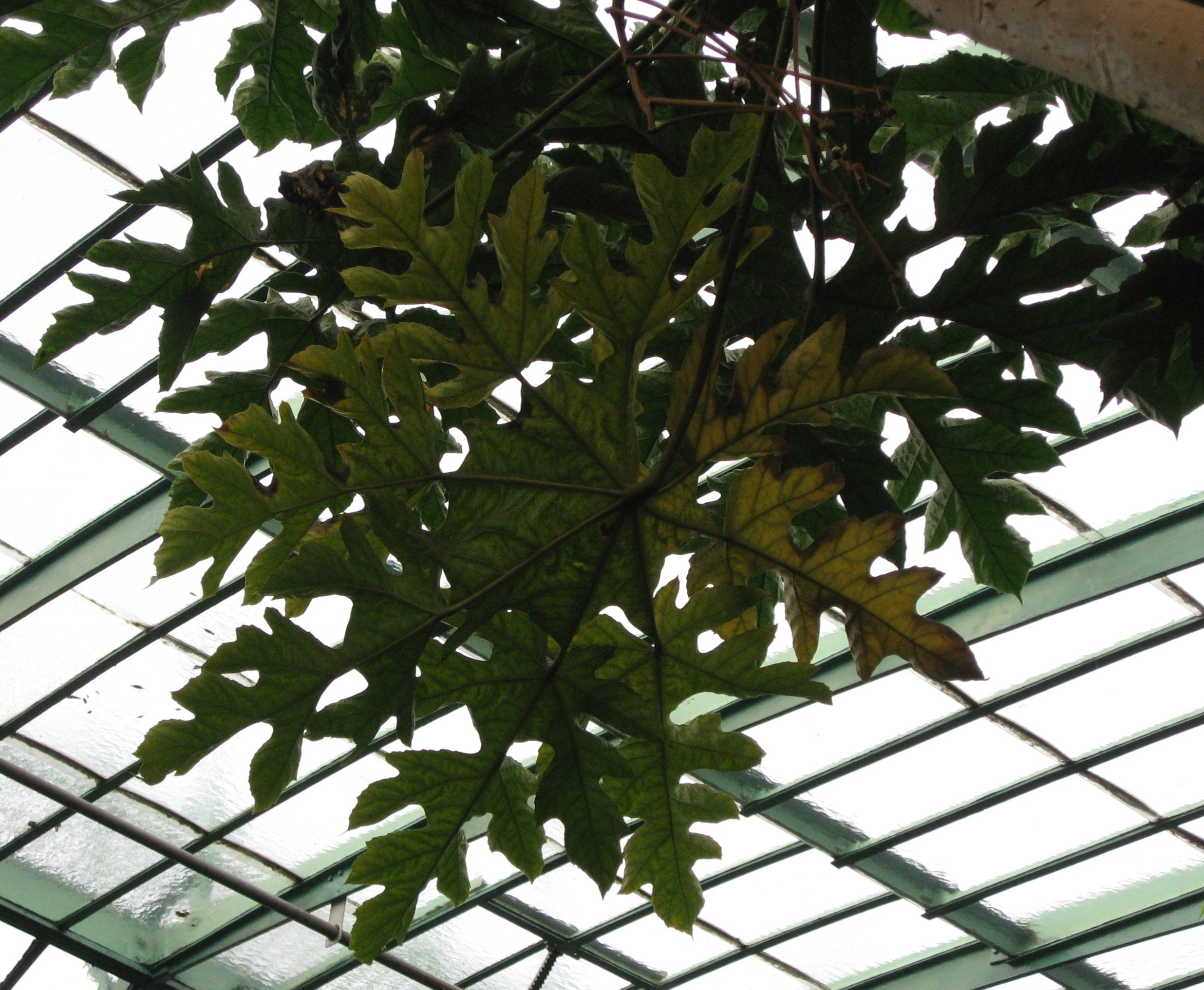 Trevesia palmata in Serres d'Auteuil